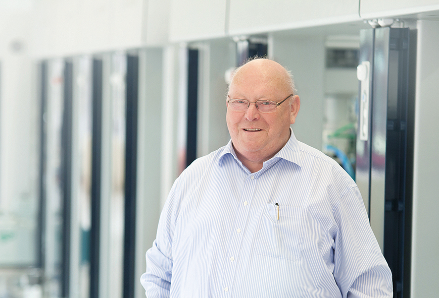 Gerhard Schubert, Gründer und Geschäftsführender Gesellschafter der Gerhard Schubert GmbH